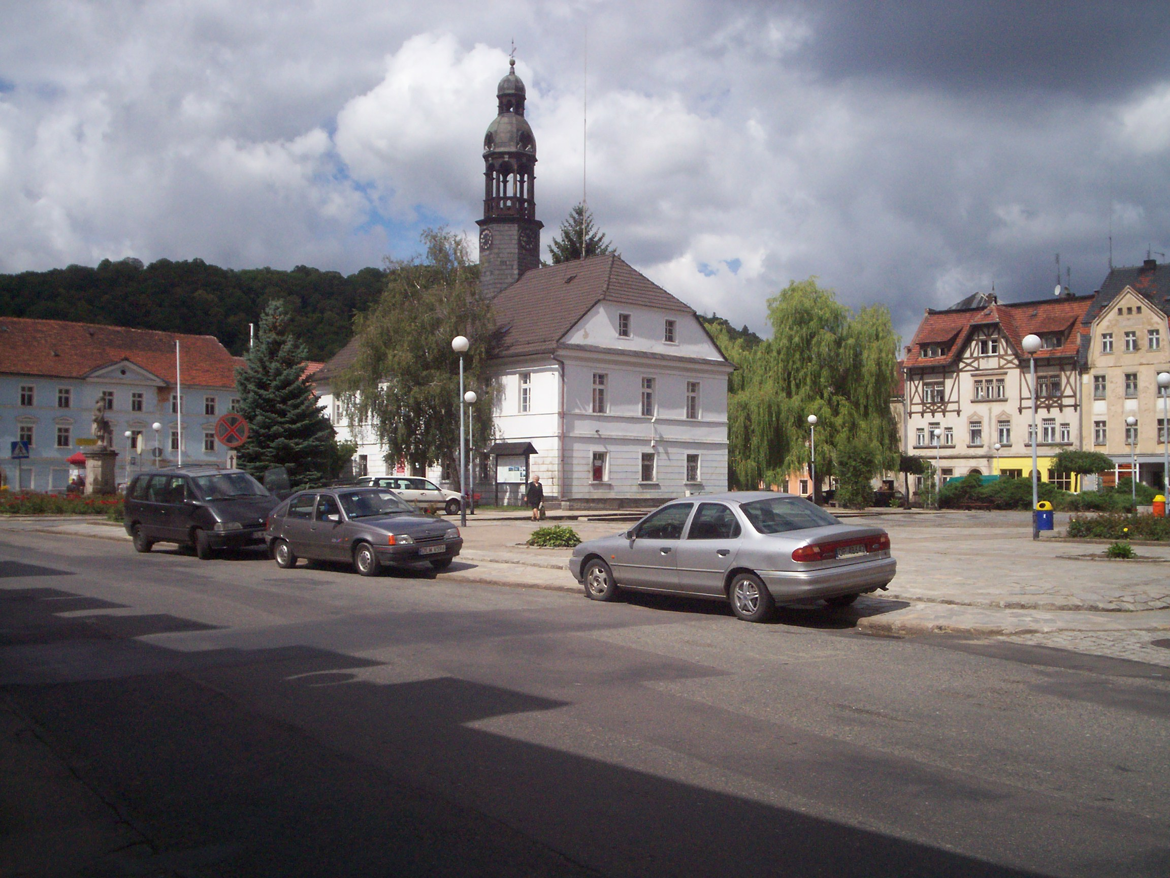 Ratusz we Wleniu